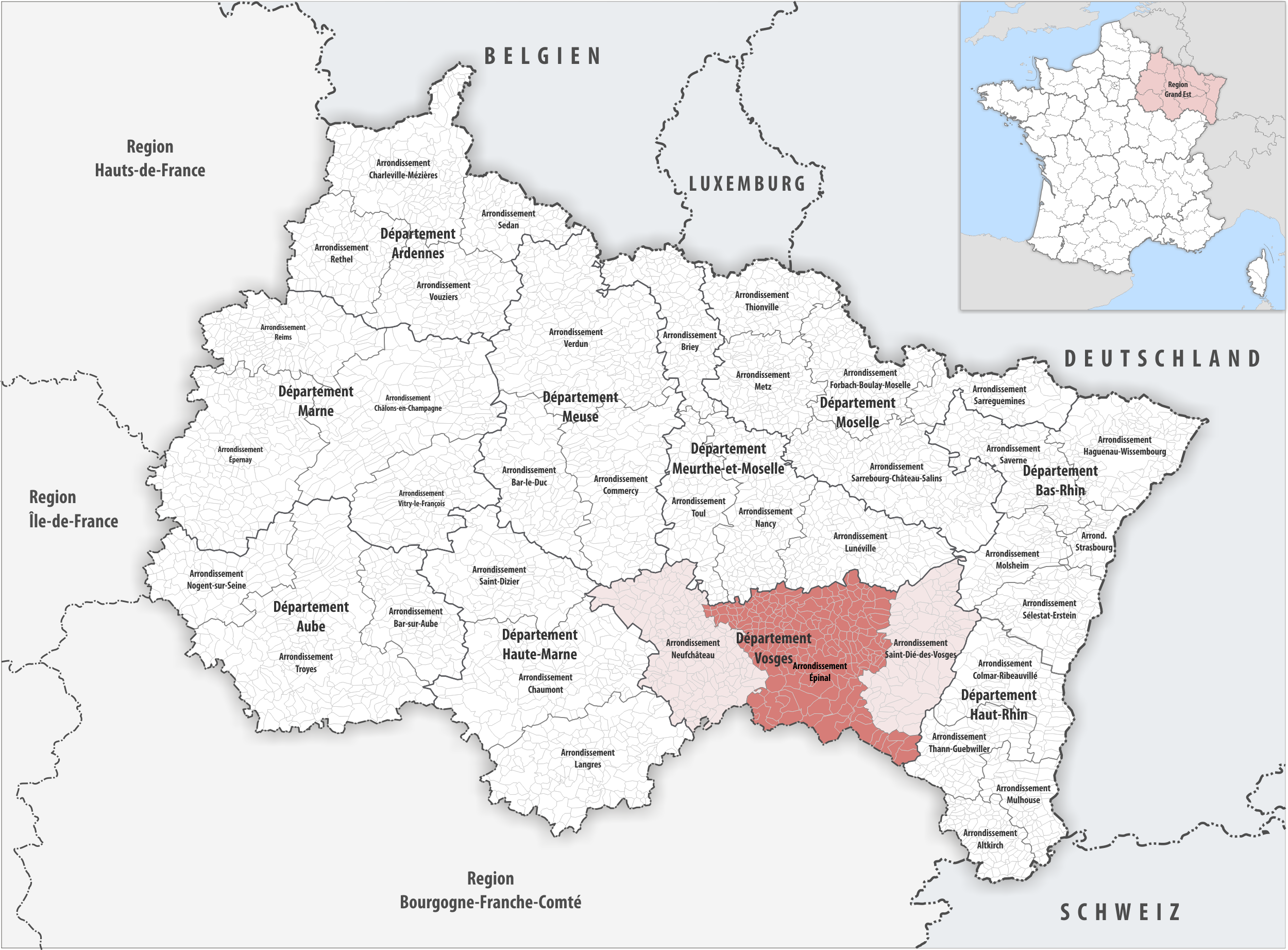 Lage des Arrondissements Épinal